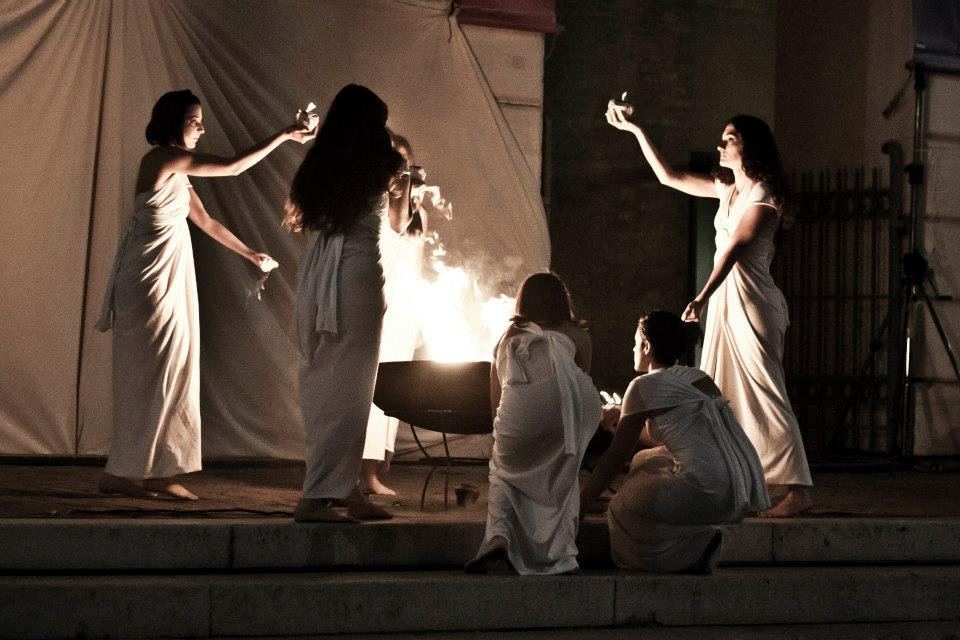 La foto illustra un momento della celebrazione dei 2400 anni dalla fondazione greca della città, tenutasi il 4 maggio 2013 ad Ancona (accensione del fuoco sacro). I rievocatori sono del gruppo "Simmachia Ellenon".